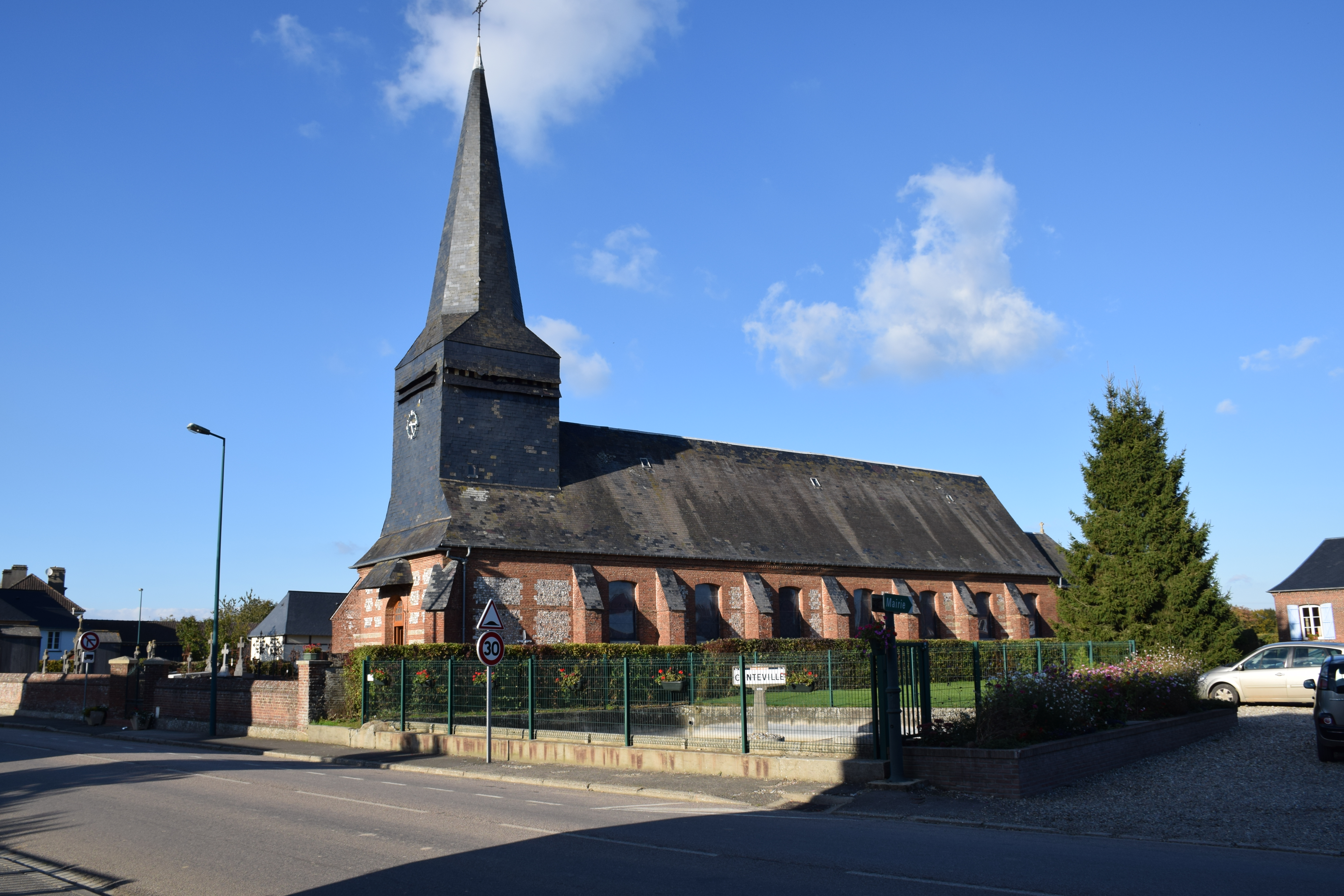 Eglise